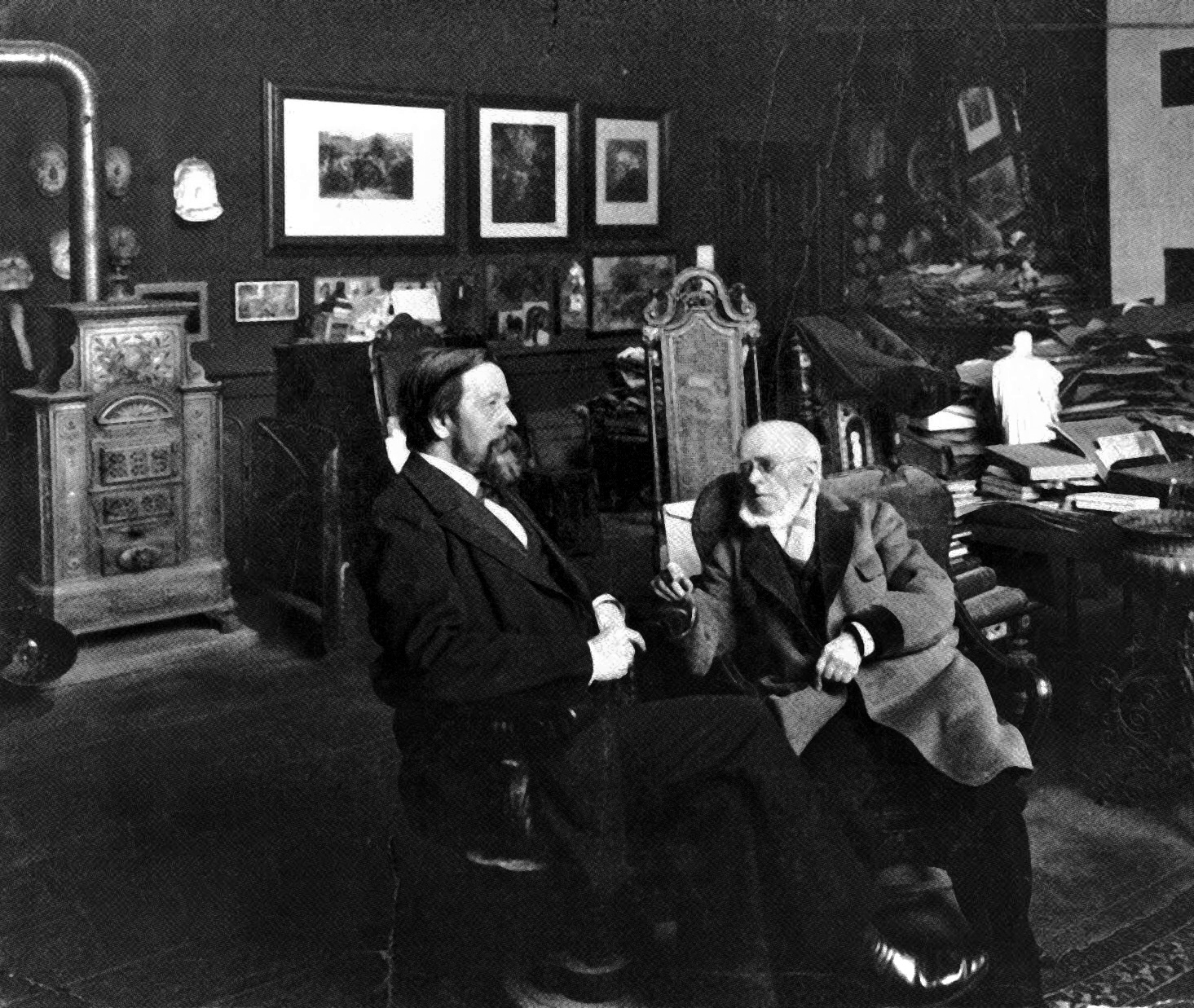 Adolph Menzel (rechts) mit Anton von Werner im Atelier. Fotografie, um 1895